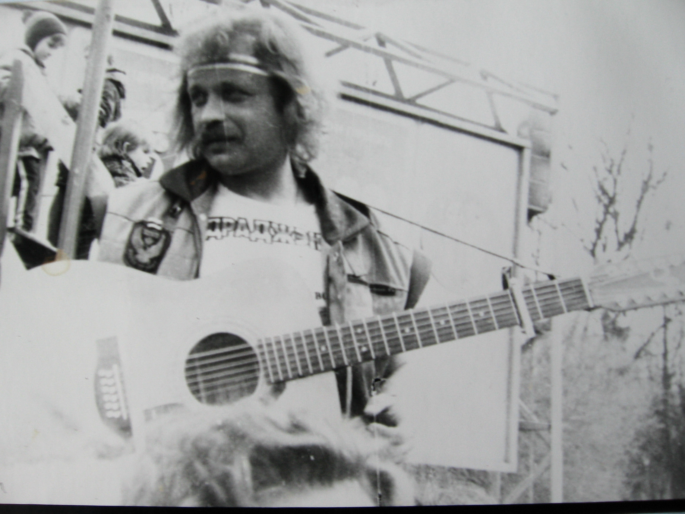 Беларускі паэт, бард Сяржук Сокалаў-Воюш. 1990 г.